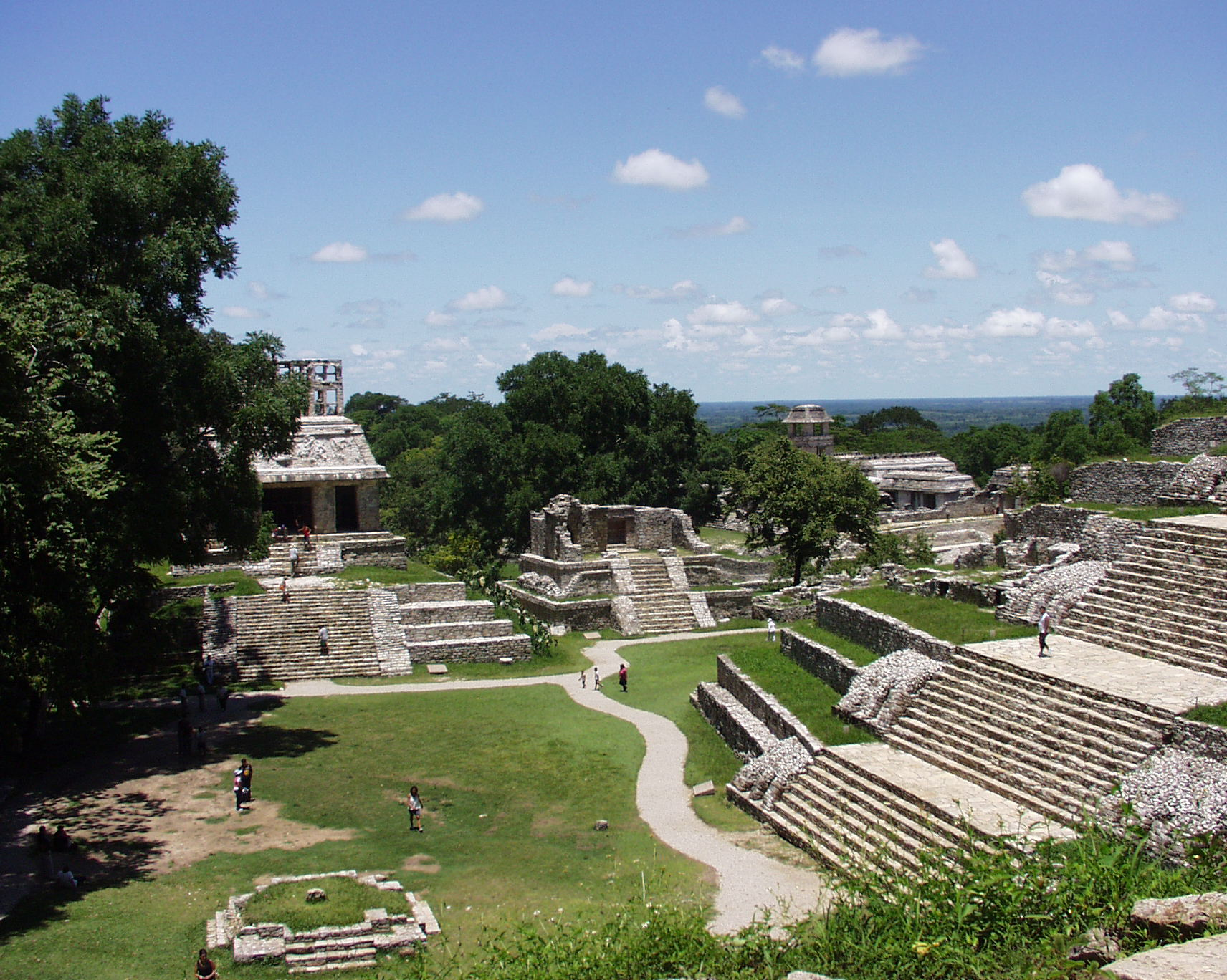 Site archéologique de Palenque.